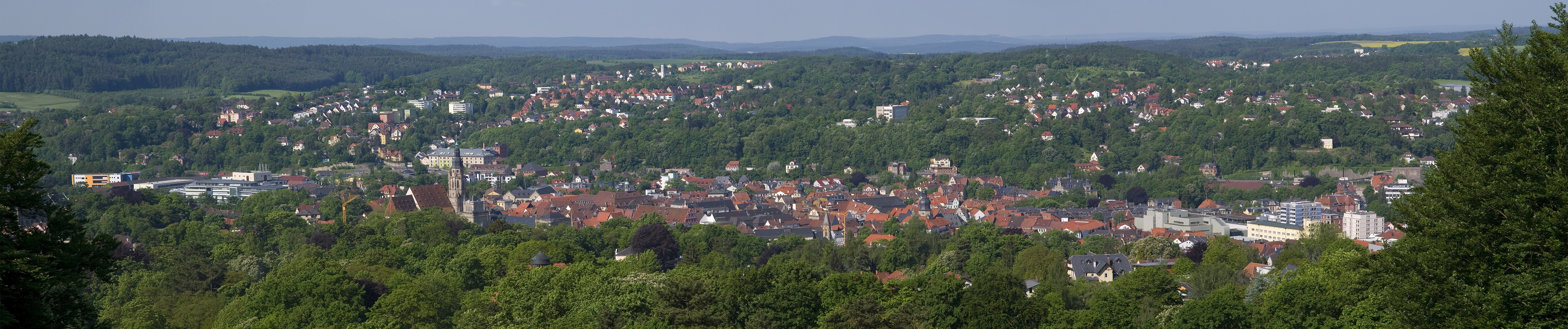 Panorama über Coburg